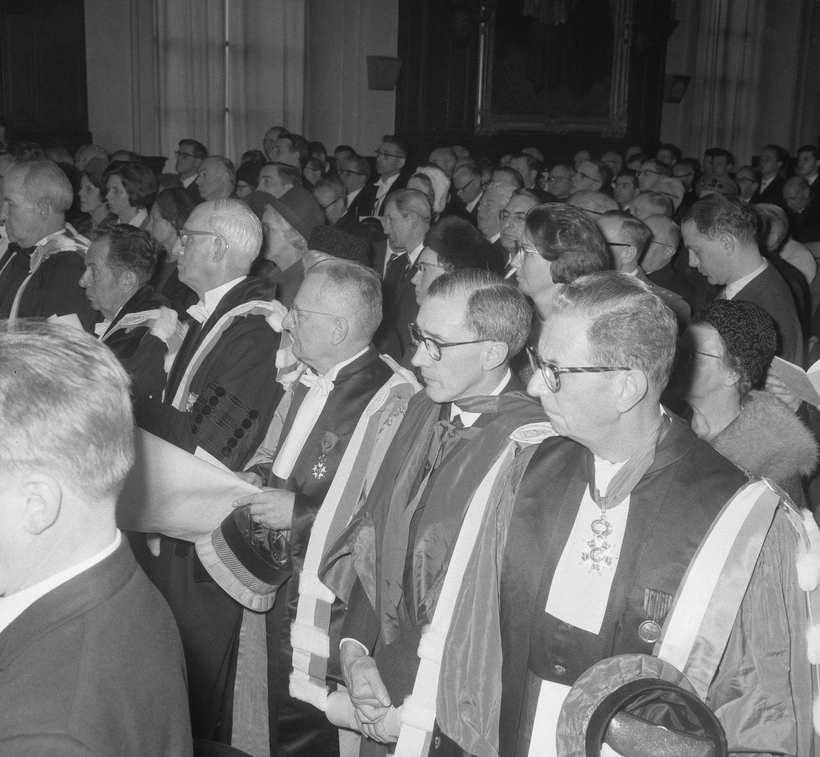 Ere-doctoraten aan de Universiteit te Leuven, v.l.n.r. prof. dr. Clyde Summers (??), prof. dr. Andre Lwoff, prof. dr. Raymond Lebegue, prof. dr. Pierre Montet. 2 febr. 1966